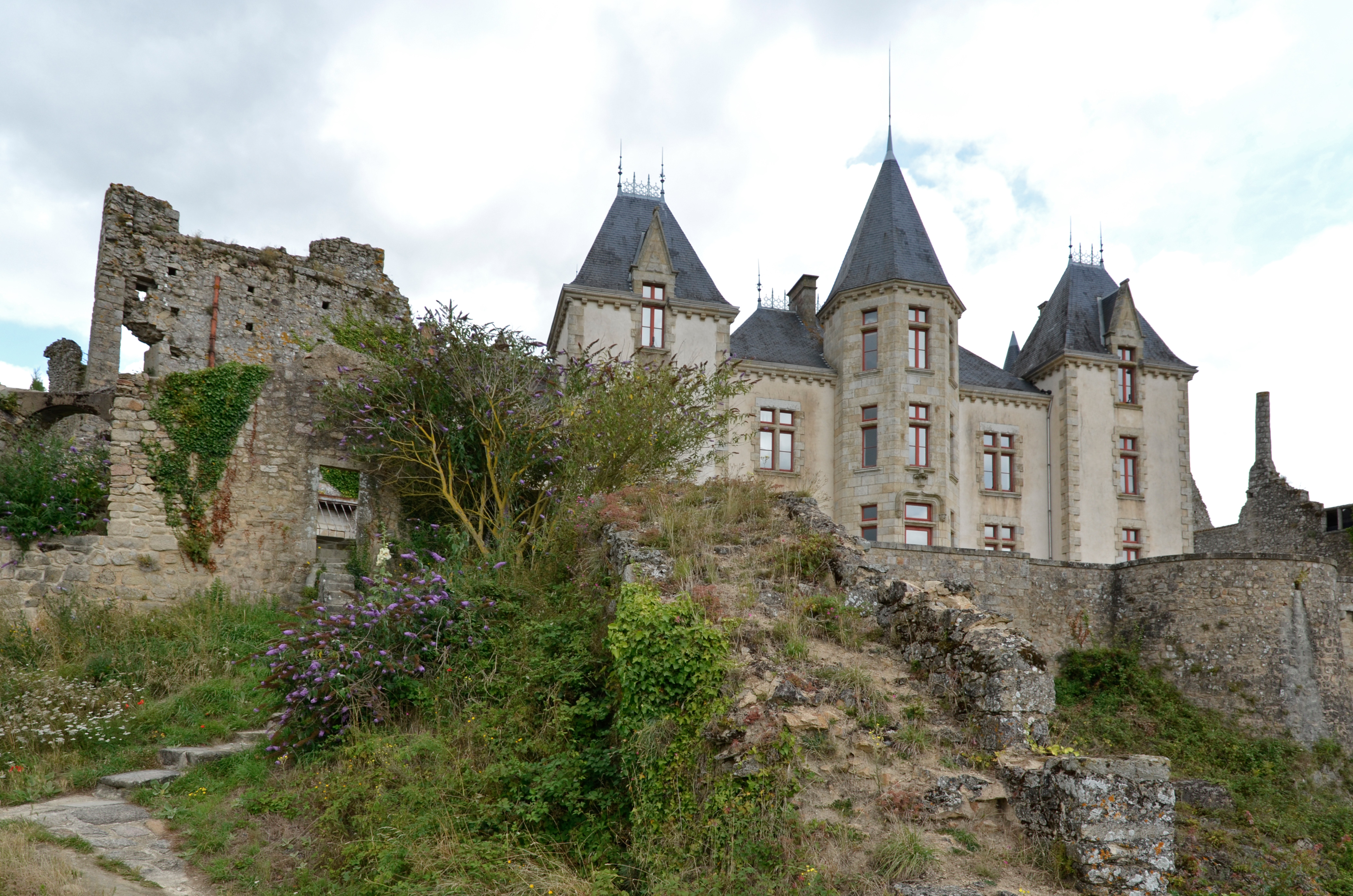 Château de Bressuire - Deux-Sèvres .